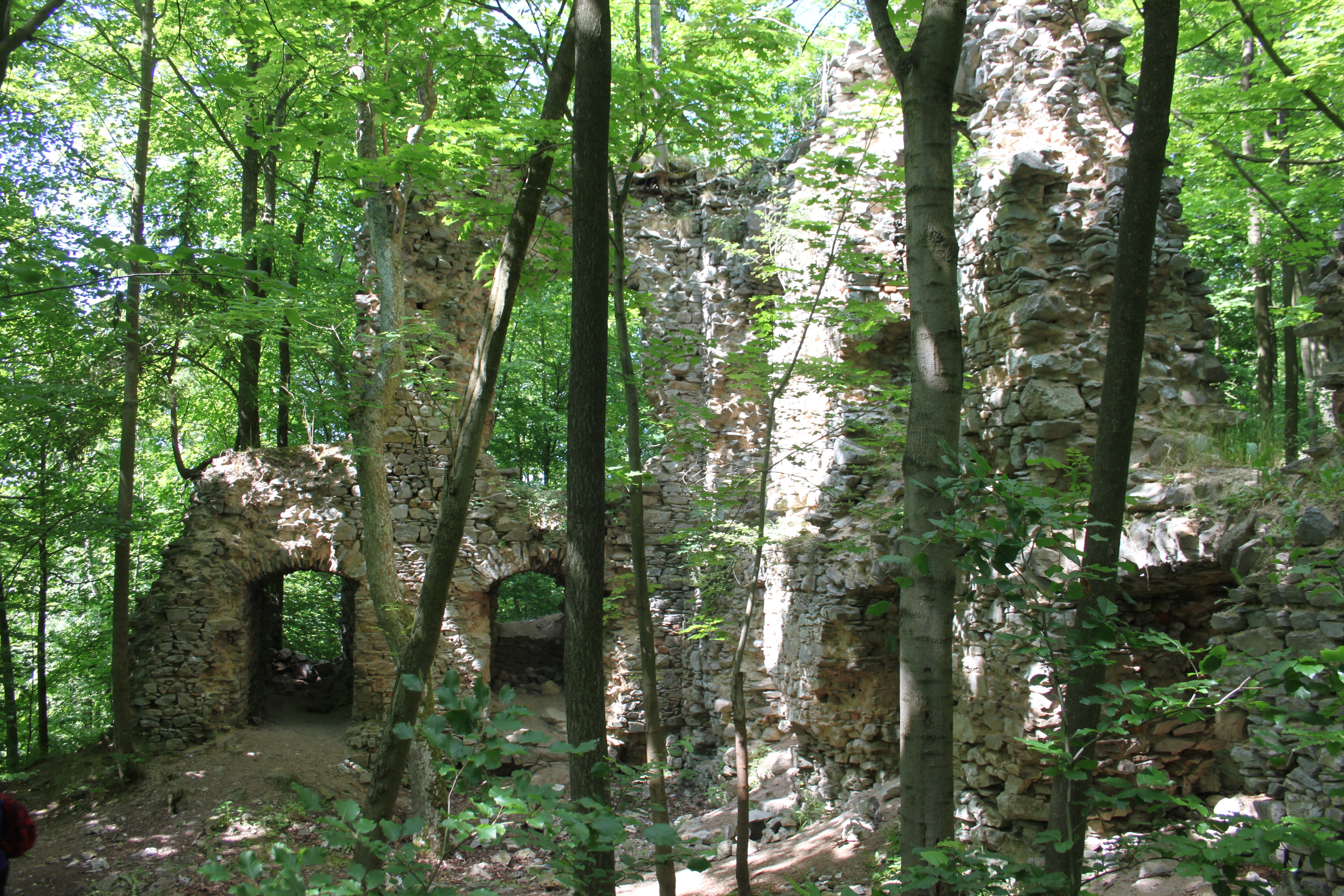 Zříceniny hradu v roce 2014